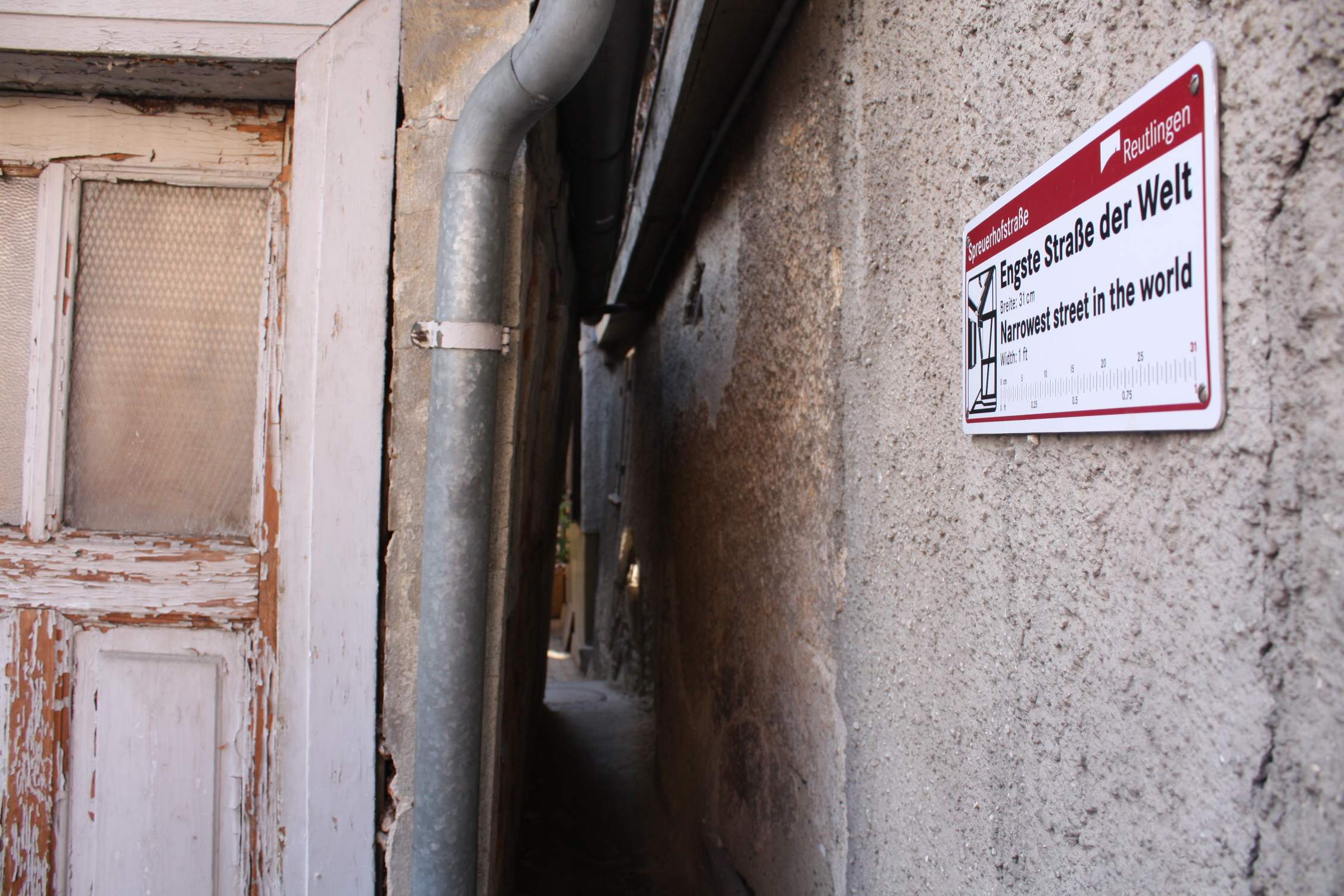 Spreuerhofstraße, Reutlingen, Germany